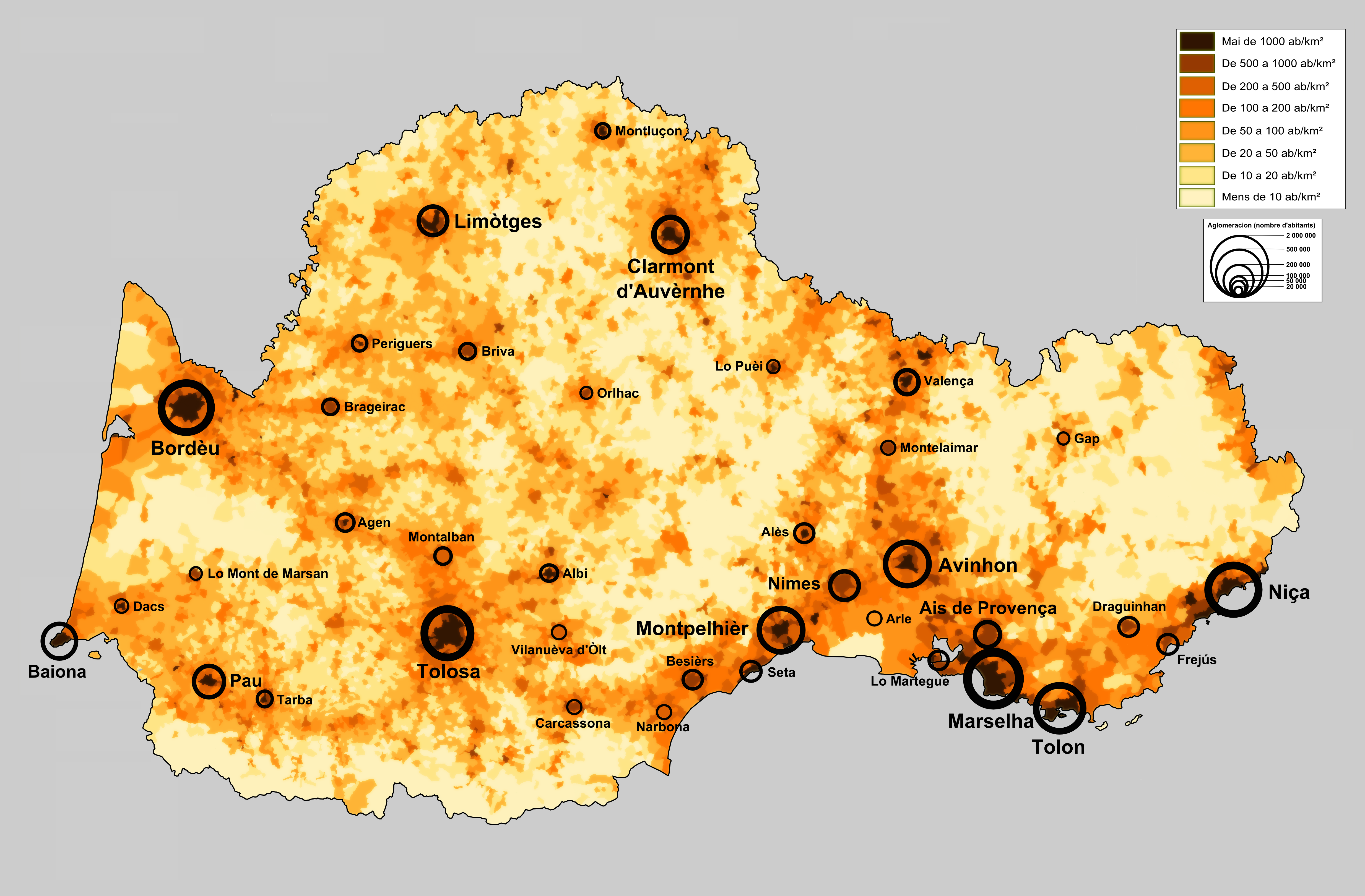 Densitat de populacion d'Occitània.